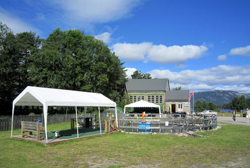 Lokstall og svingskive ved Treungen stasjon i 2012. Svingskivens grav er fylt med vann.